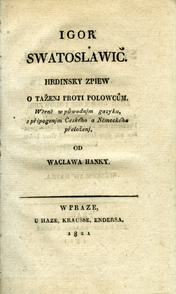 Pvní české vydání Slova o pluku Igorově